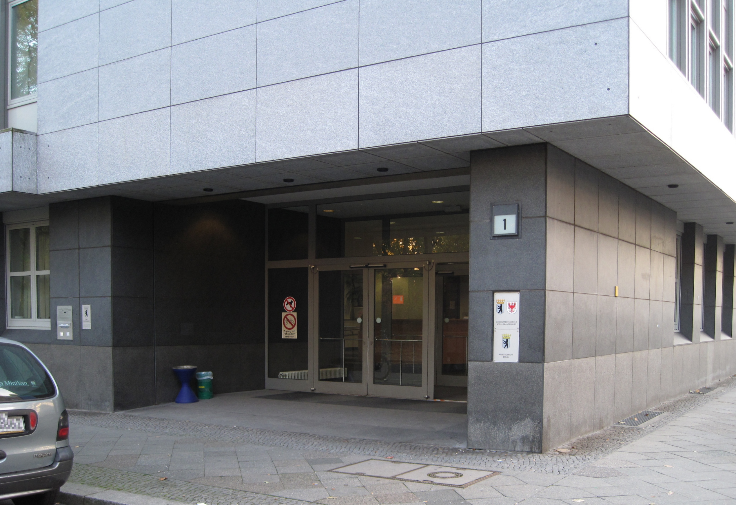 Arbeitsgericht und Landesarbeitsgericht in Berlin, Magdeburger Platz 1.